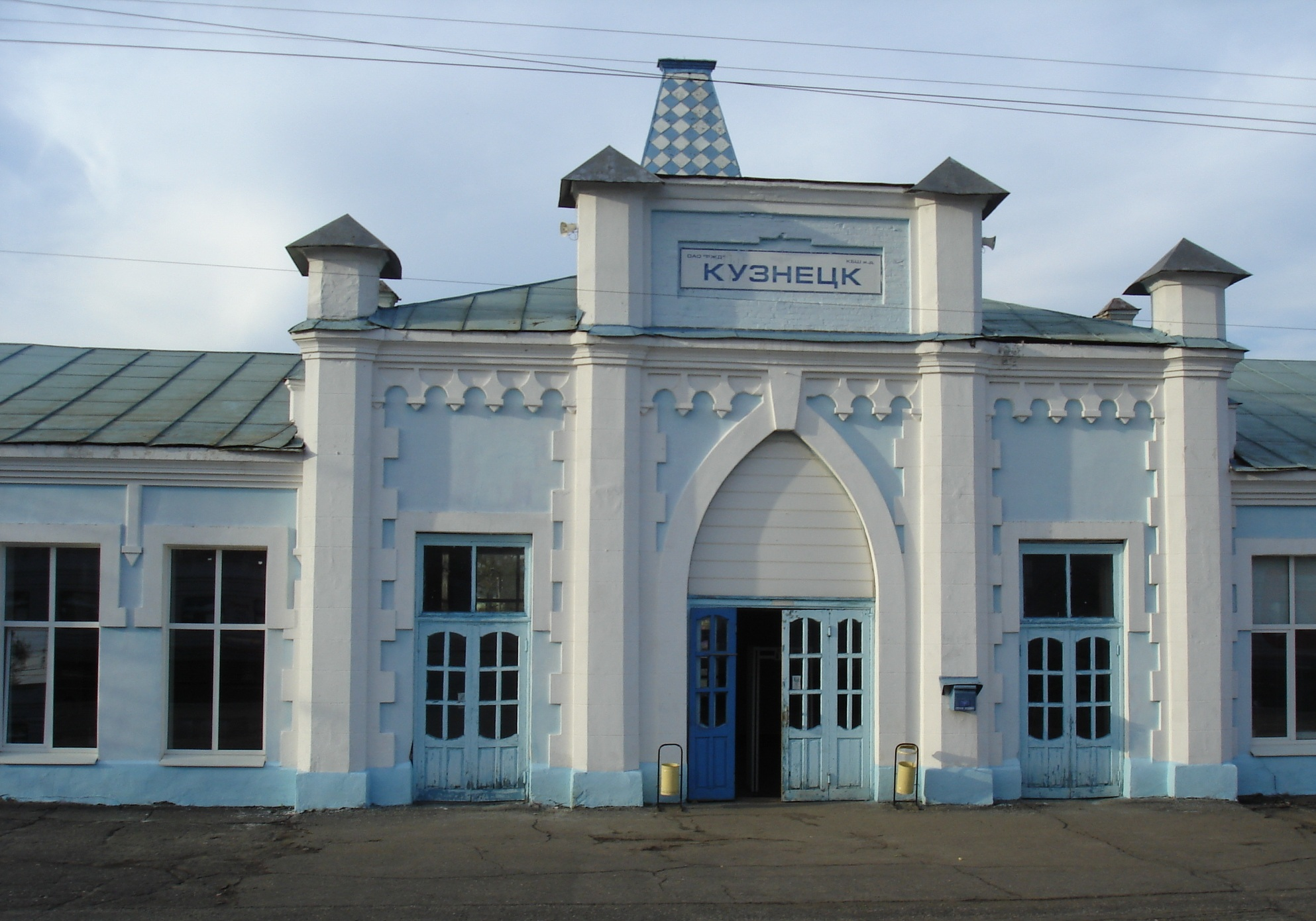 Главный выход на перрон станции Кузнецк